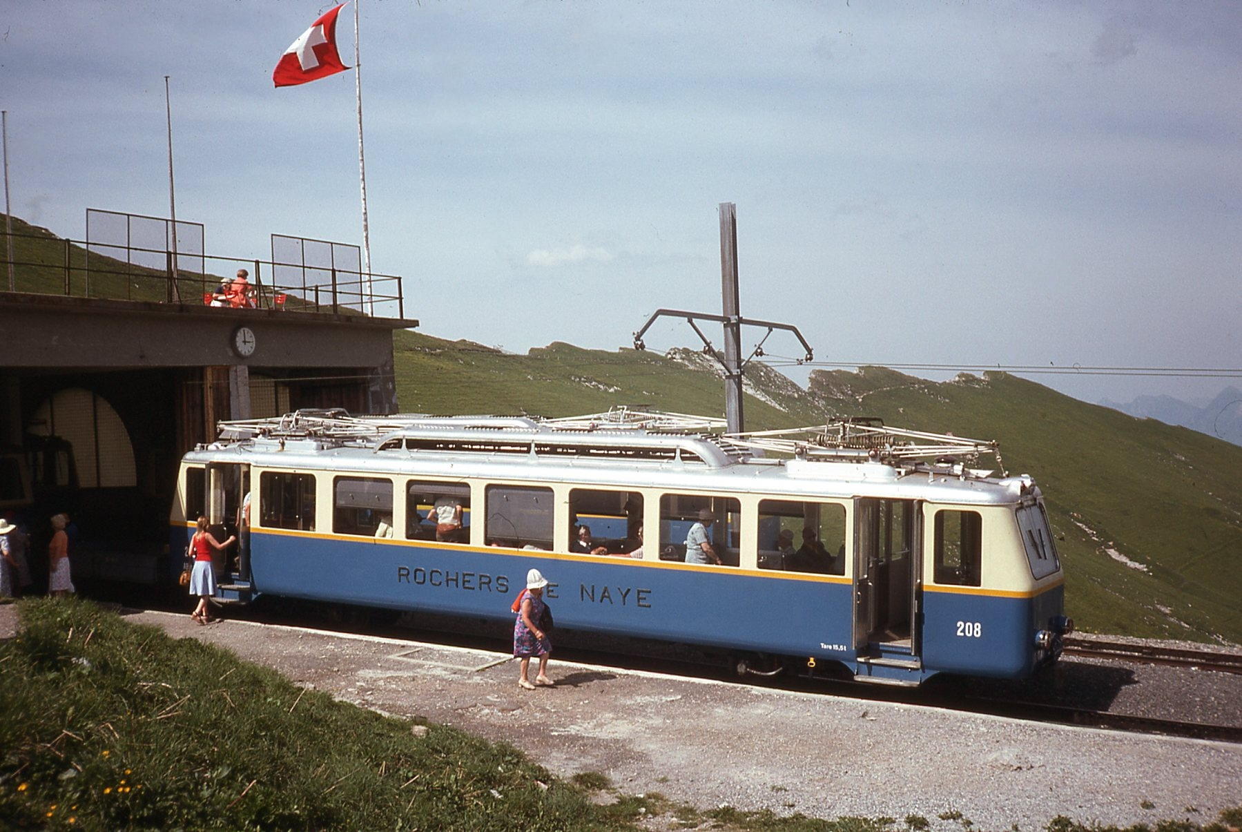 Photo. Trams aux Fils Prise en juin 1978 à la gare sommitale des Rochers de Naye La ligne du Montreux Glion Naye à été construite entre 1892 et 1909, à voie étroite (80cm) et à crémaillière, sa longueur et de 10,5 Kilomètres, sa déclivité est de 220%.